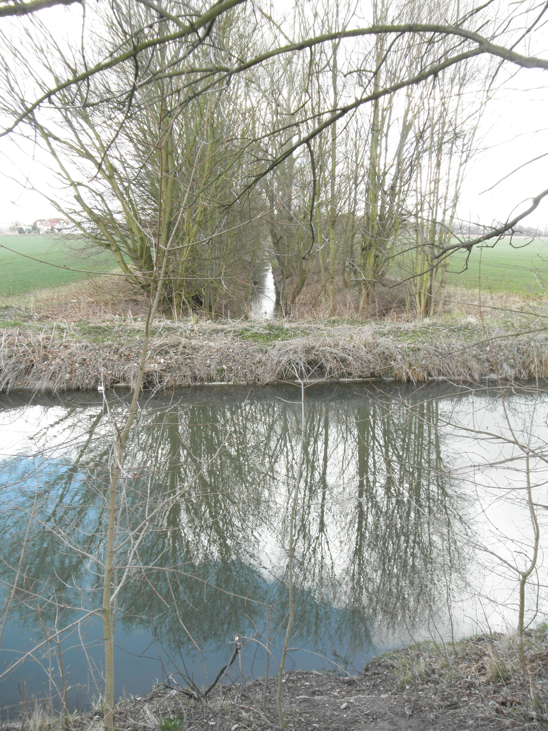 Halda